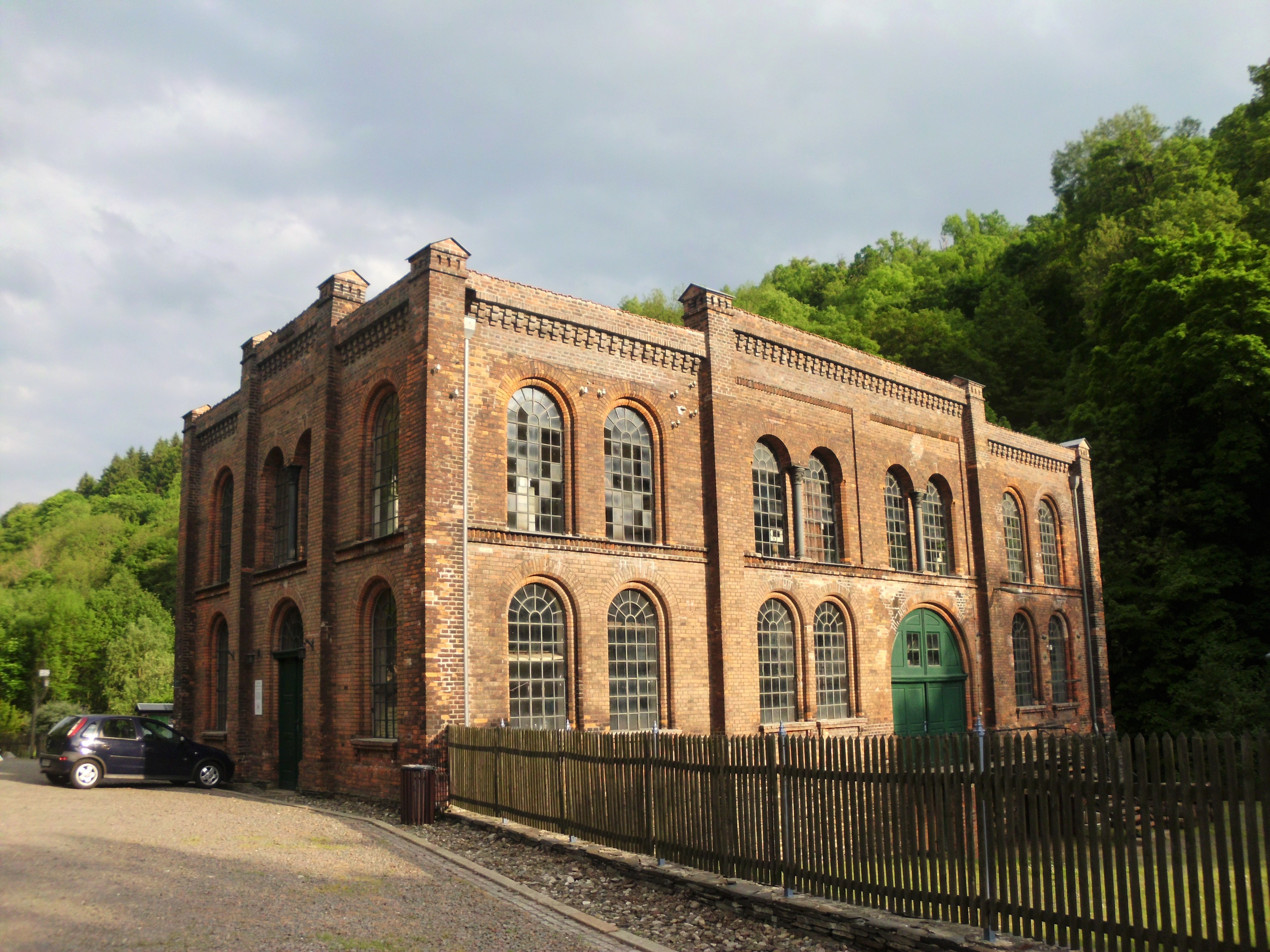 Carlswerk in Mägdesprung, Stadt Harzgerode, Landkreis Harz